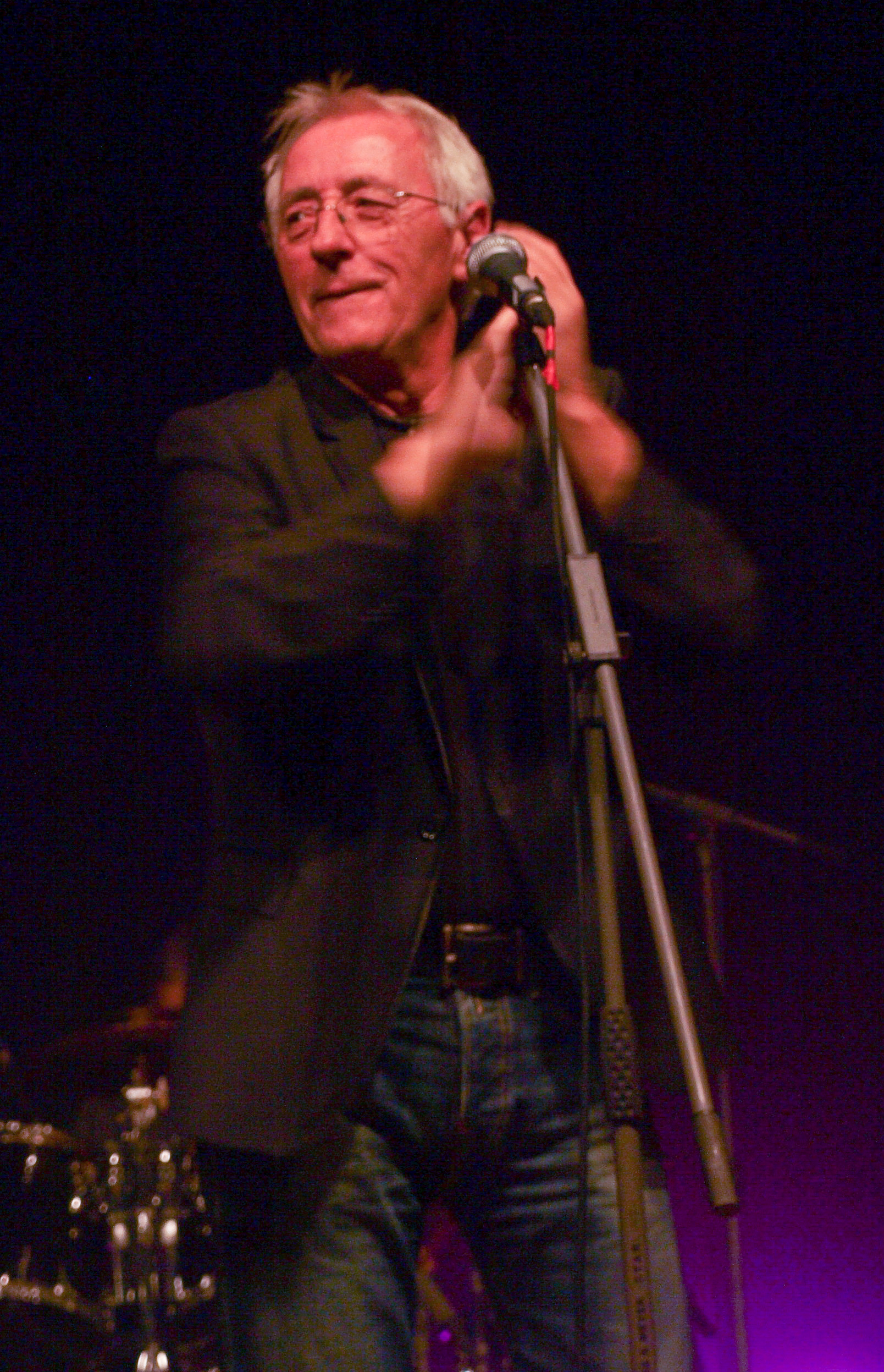 Nastup Olivera Dragojevića u Split, 10. prosinca 2010. godine.